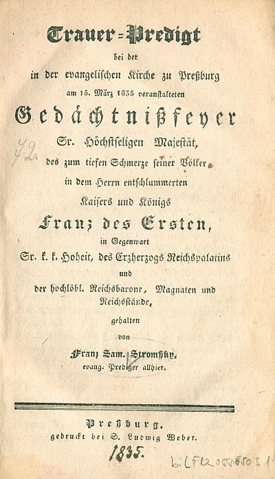 Die Predigt wurde in der Deutschen Evangelischen Kirche A. B. zu Preßburg anlässlich des Ablebens von Kaiser Franz den Ersten gehalten.